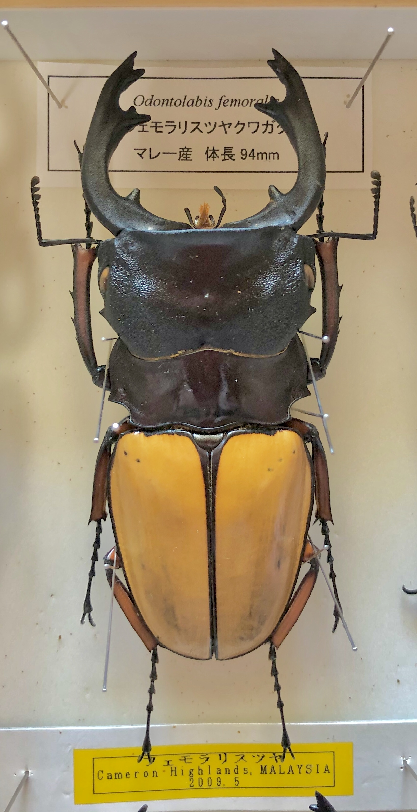 フェモラリスツヤクワガタ マレー産 94㎜①